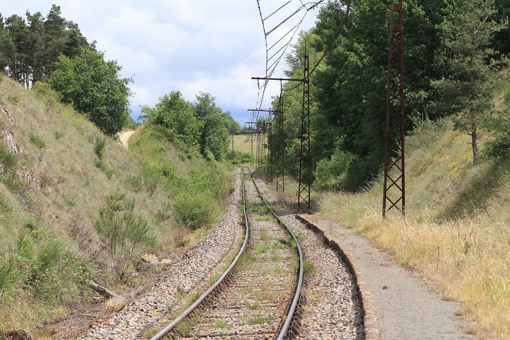 La gare de Garabit en direction de Béziers en juin 2011, Cantal, France.